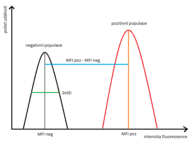 Vyznačené hodnoty užívané k výpočtu Stain Indexu